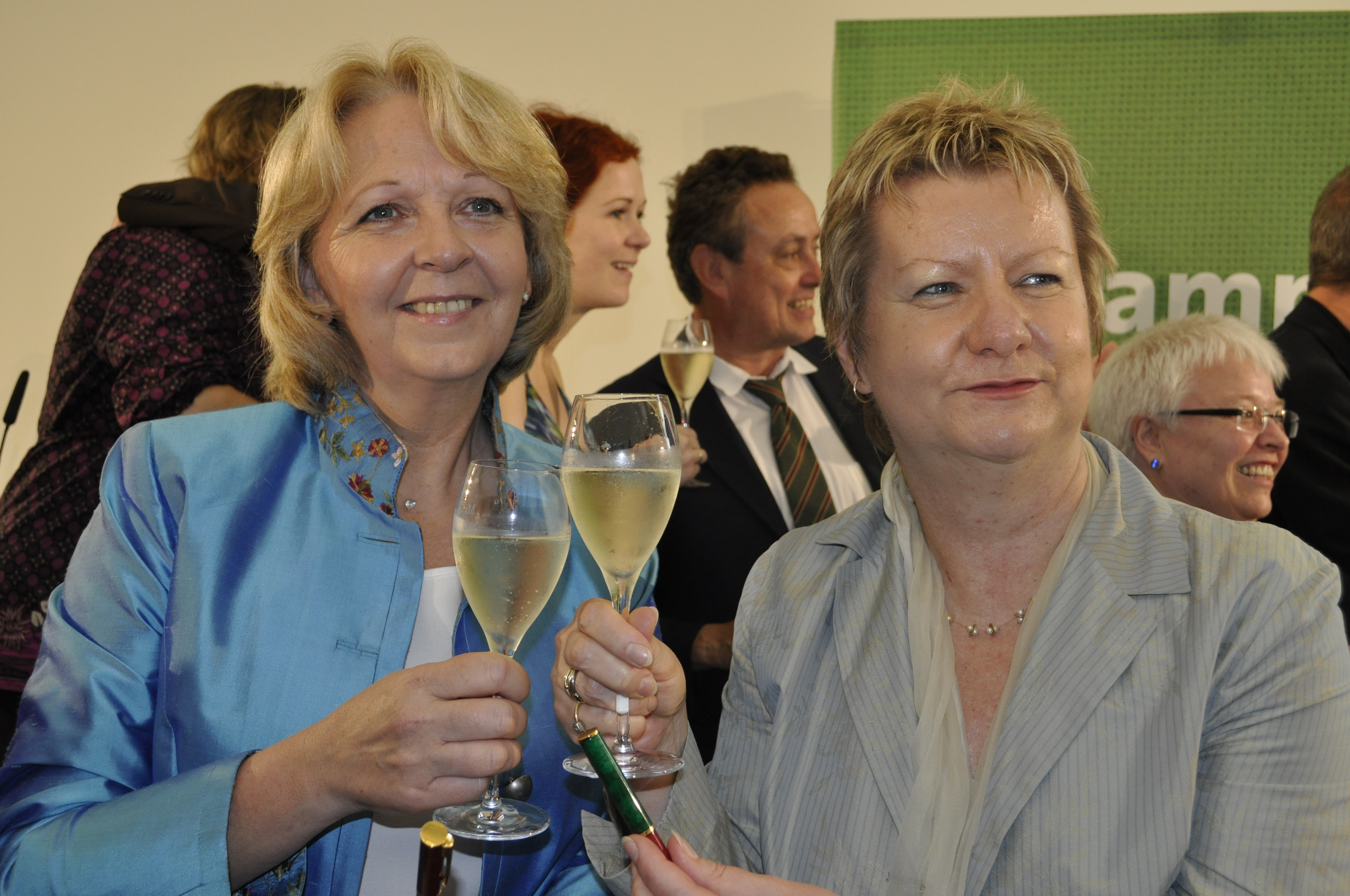 2010-07-12 Koalitionsvertrag-Unterzeichnung